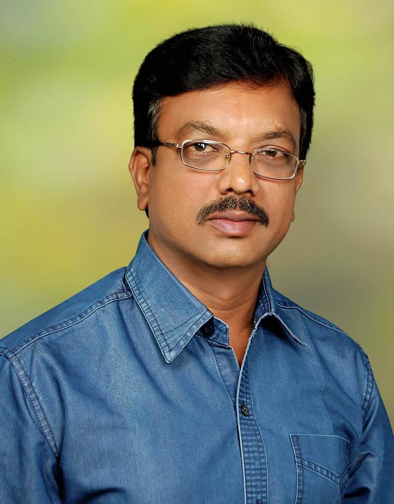 కథా రచయిత బాలసాహితీవేత్త , చరిత్రకారుడు